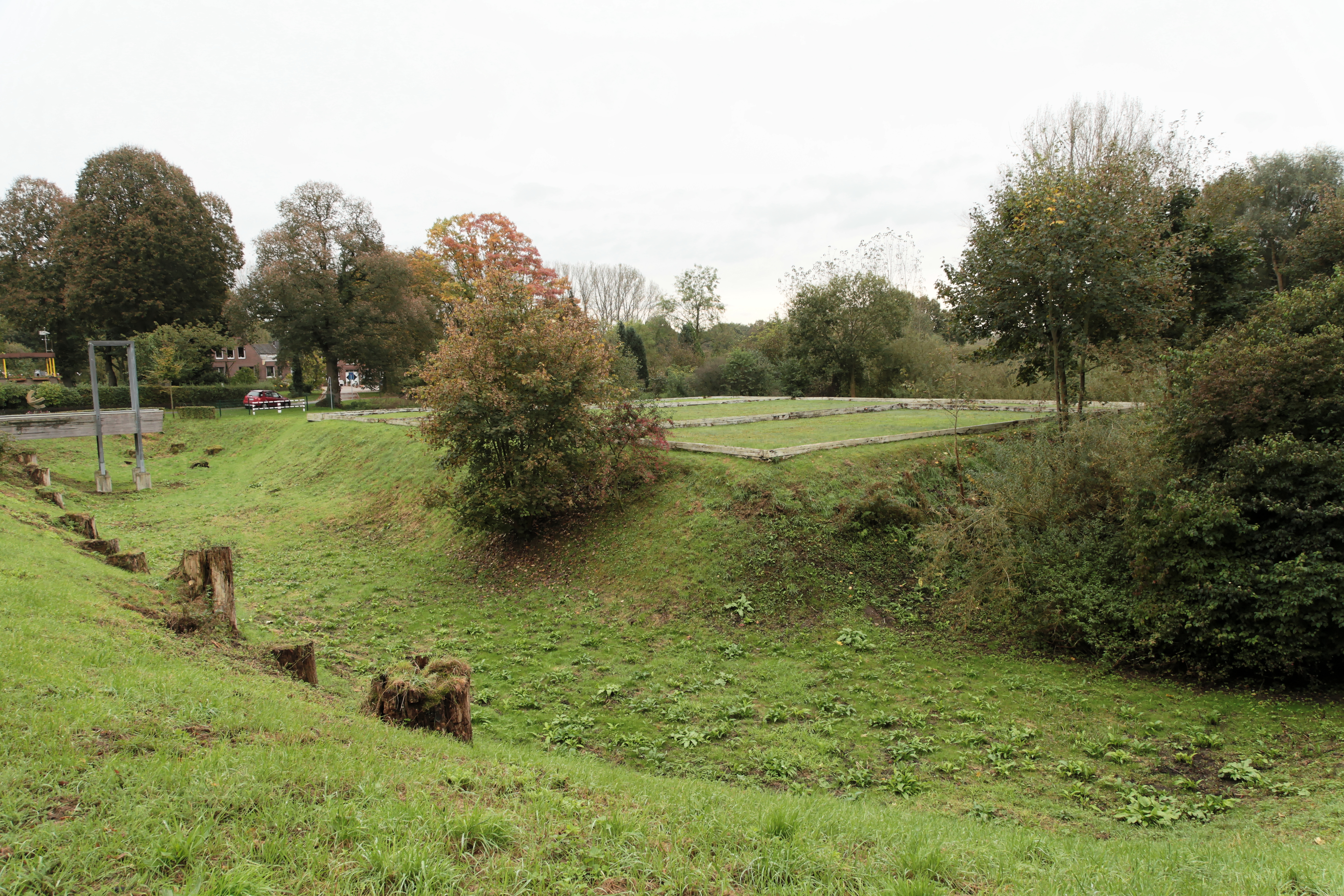 Burg Schöneflieth, Schöneflieth in Greven